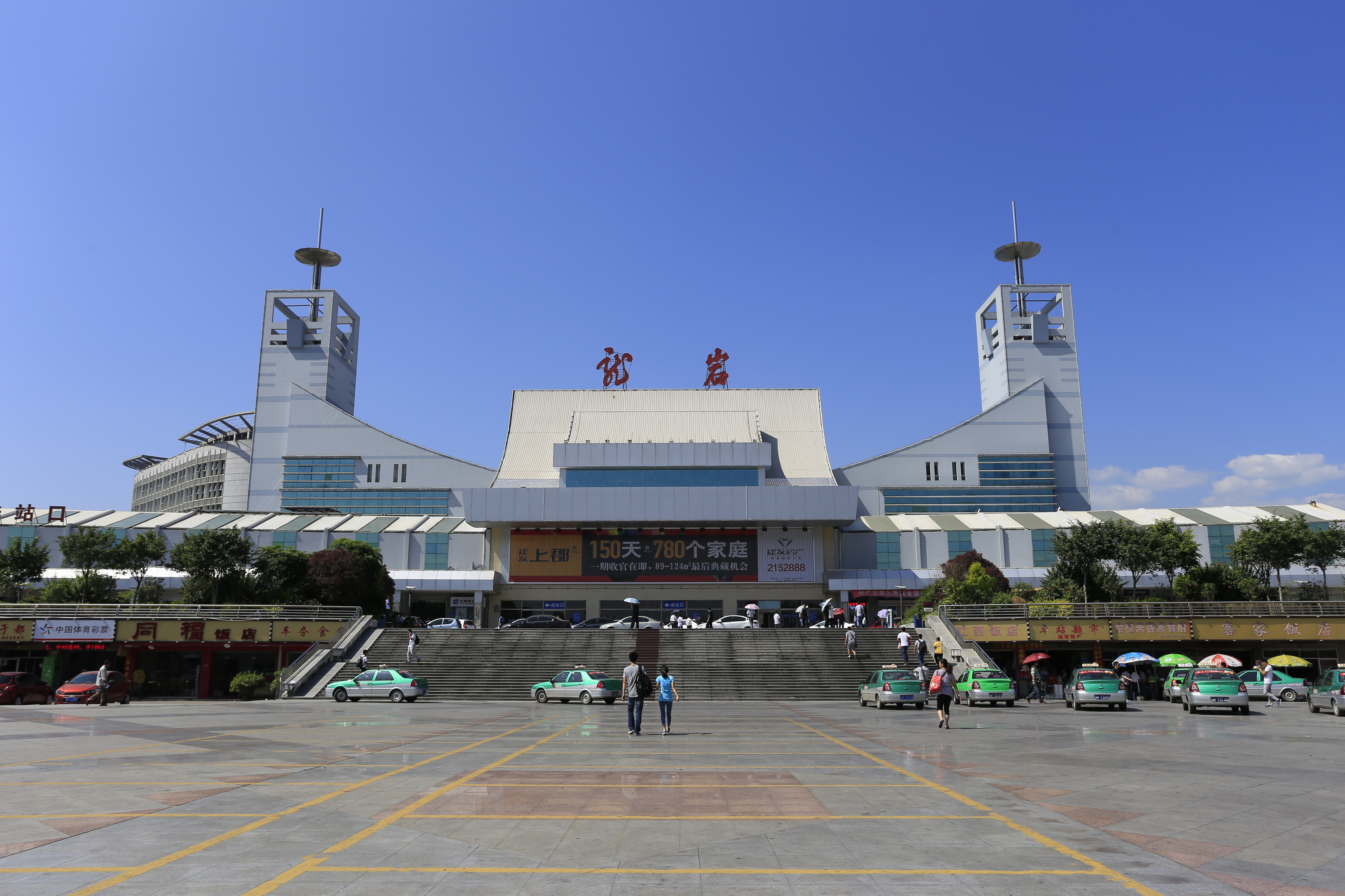 龙岩火车站